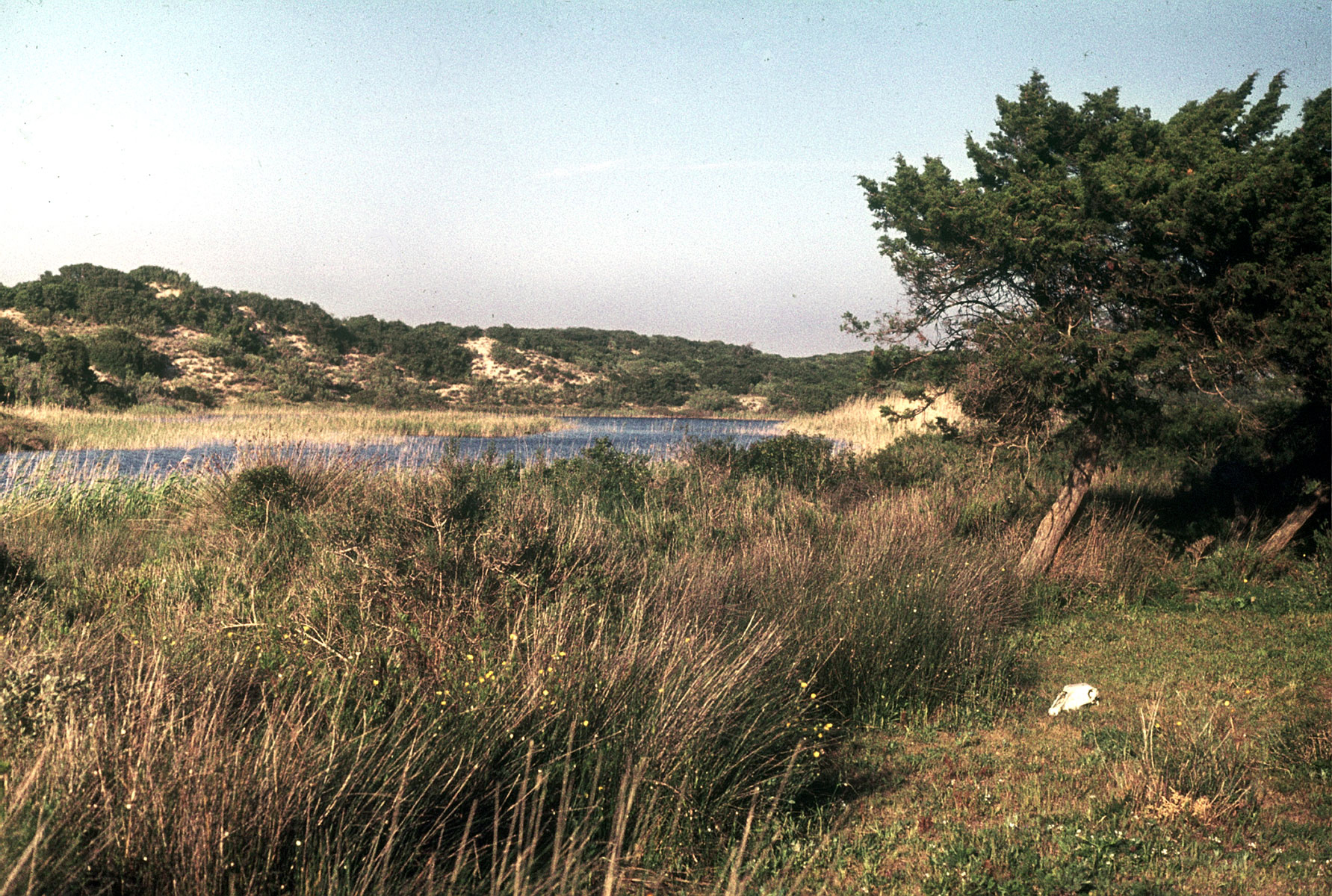 Dunes de La Macta près de Marsat El Hadjadj (Algérie). Le cordon dunaire borde un ancien bras de l'oued Macta. Dans le maquis des dunes, on trouve notamment le genévrier oxycèdre Juniperus oxycedrus (1 ex. au premier plan, à droite). Au pied des dunes, une plage de joncs Juncus sp. en bordure d'une phragmitaie.